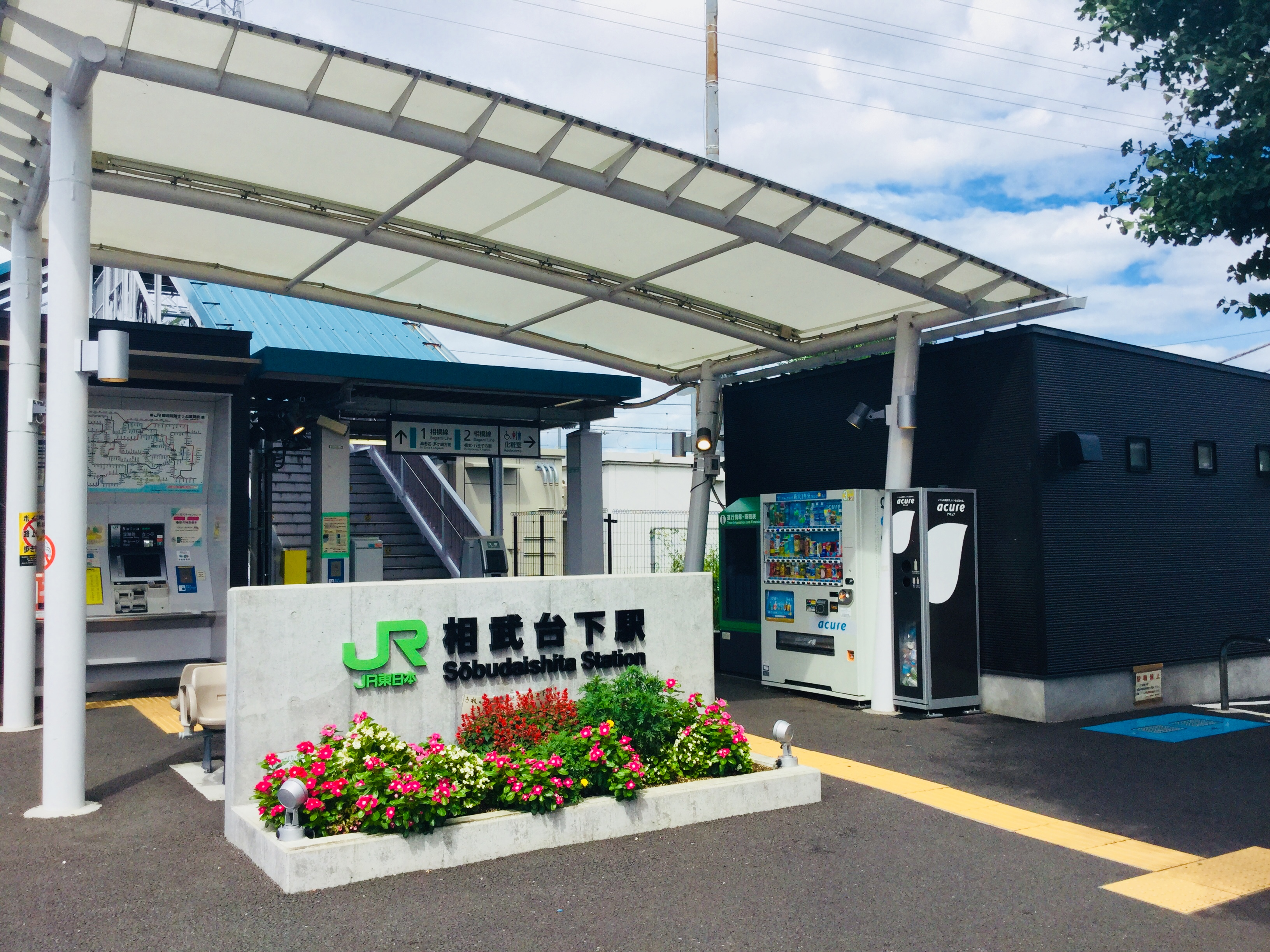 JR相武台下駅の駅舎